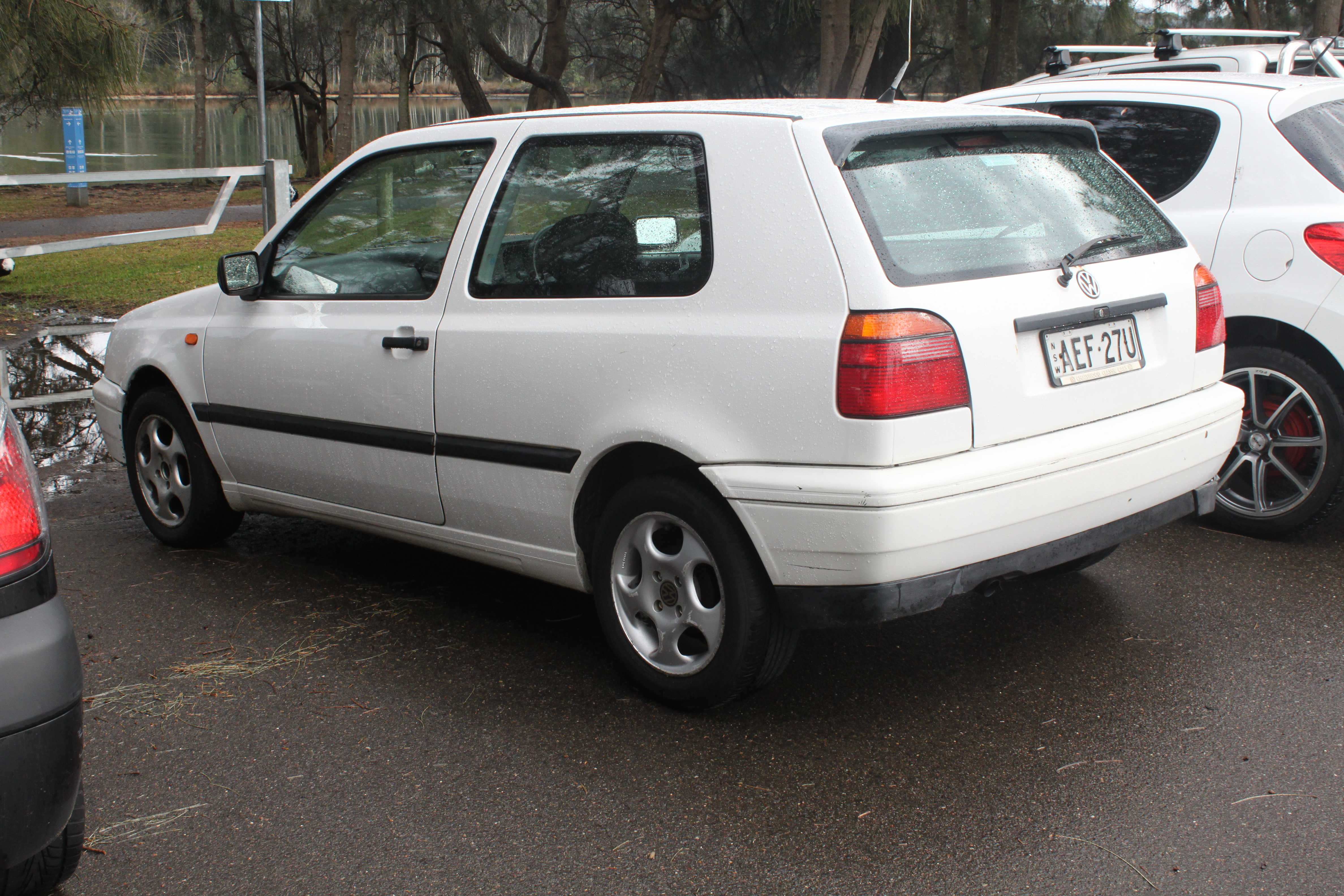 Volkswagen Golf Mk3 CL